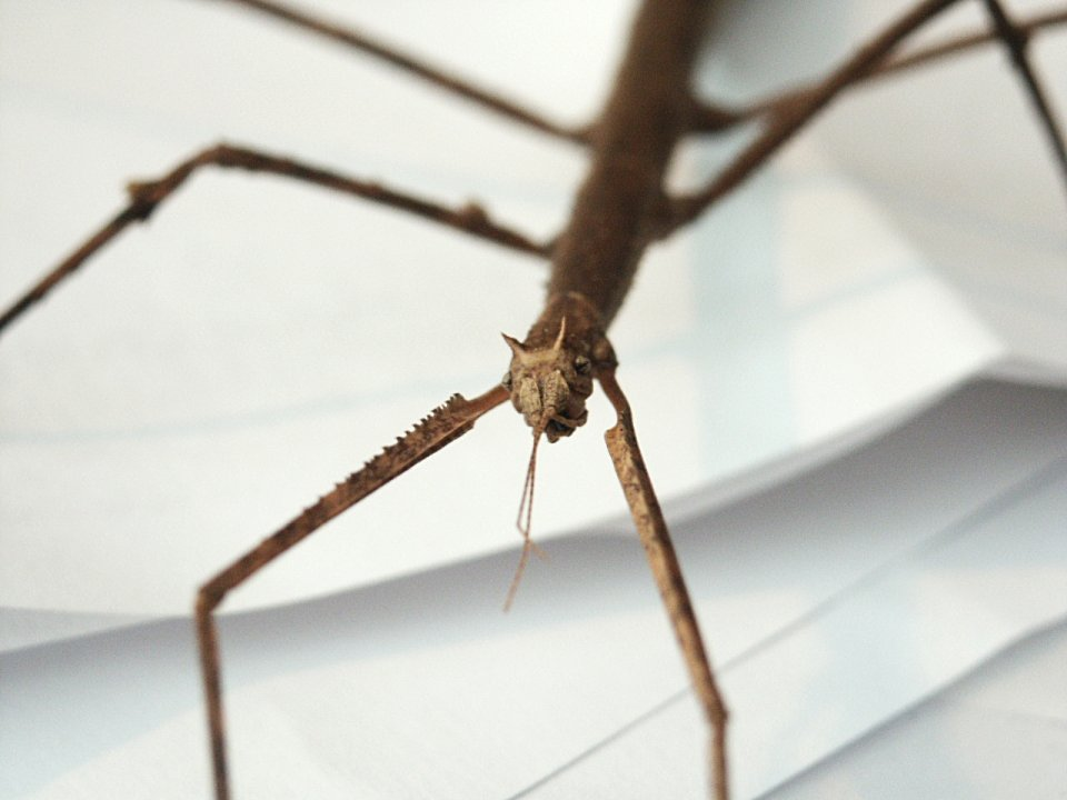 female adult Medauroidea extradentata